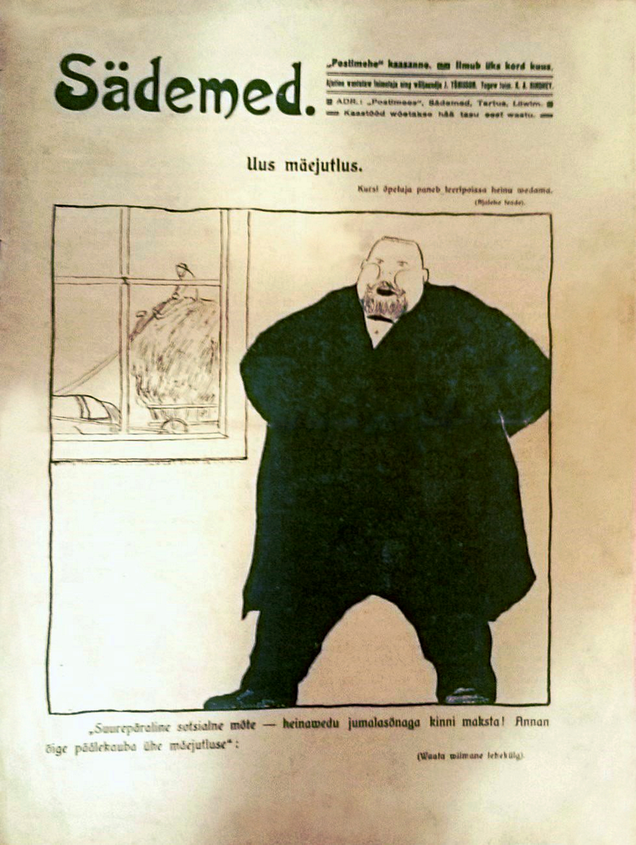 Ajalehe Sädemed esileht, märts 1910